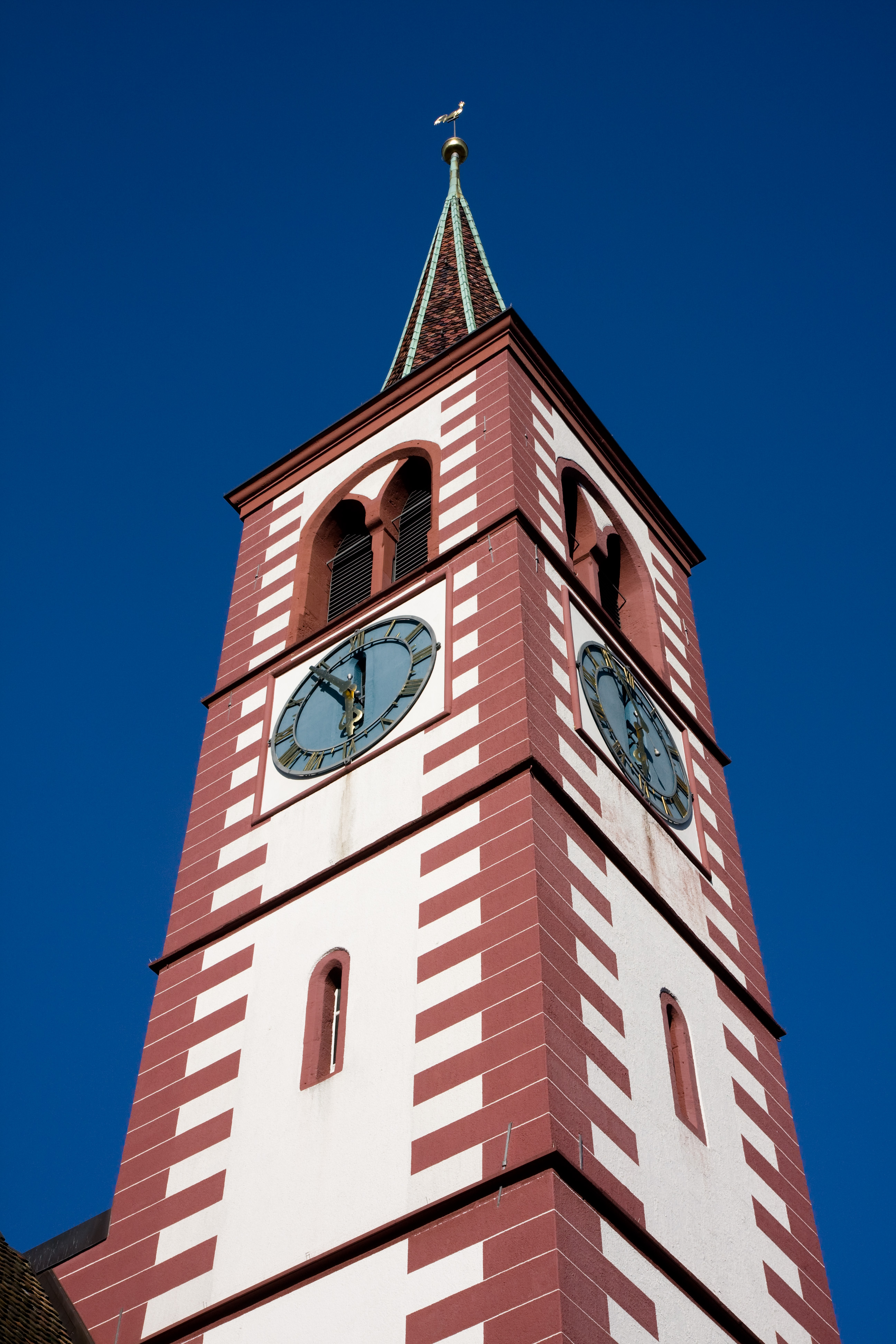 Kirchturm der reformierten Stadtkirche Liestal